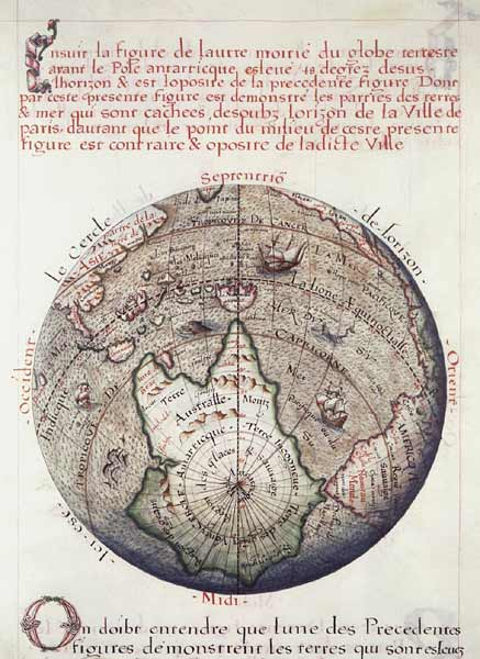 Le pôle antarctique Jacques de Vaux, Premières Œuvres (traité d'hydrographie). Cartes, dessins coloriés, lettres ornées. Le Havre, 1583. Manuscrit sur vélin (45 x 32,5 cm) BNF, Manuscrits, Fr. 150 fol. 27v